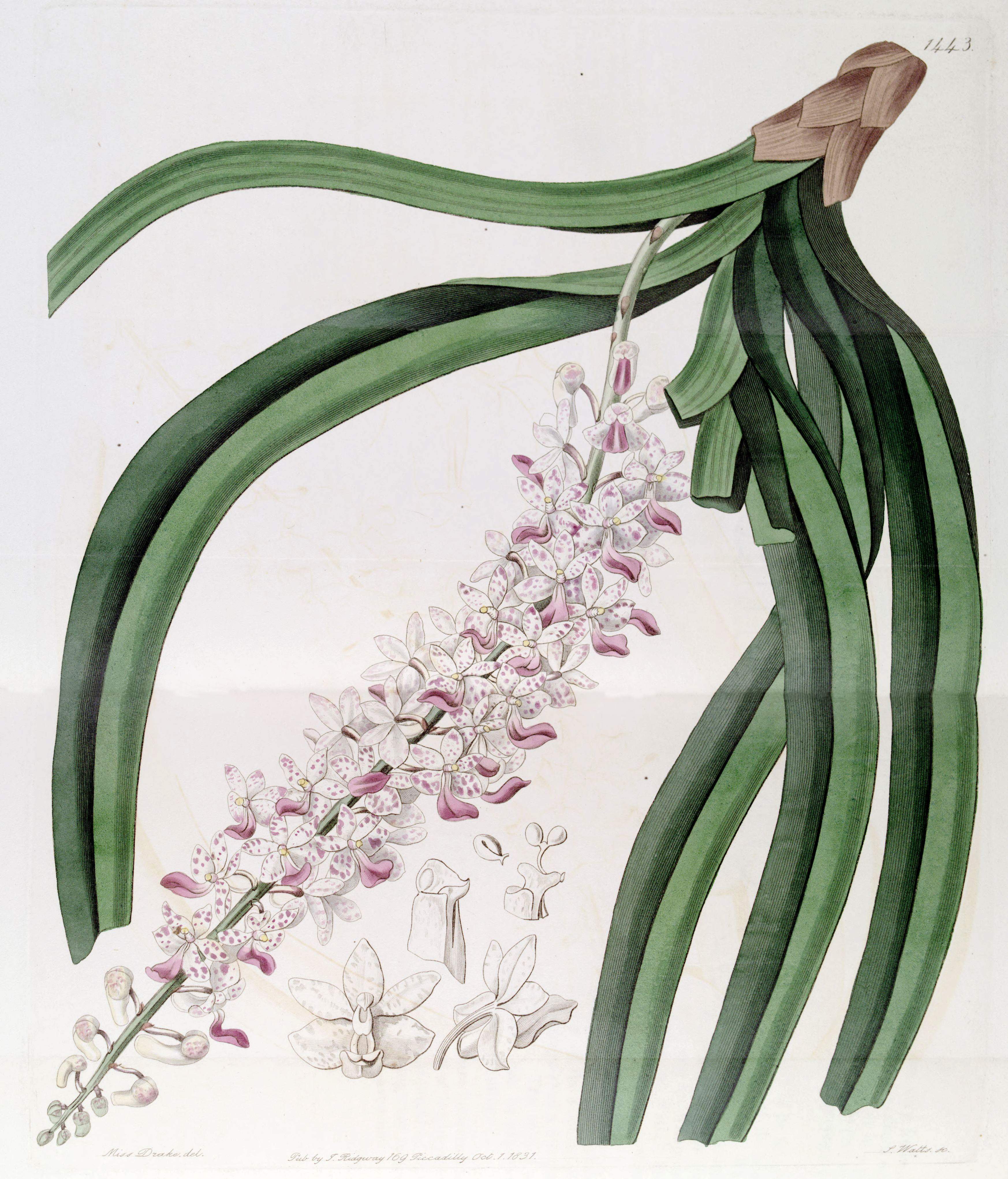 Rhynchostylis retusa (as syn. Eulophia mackaiana)